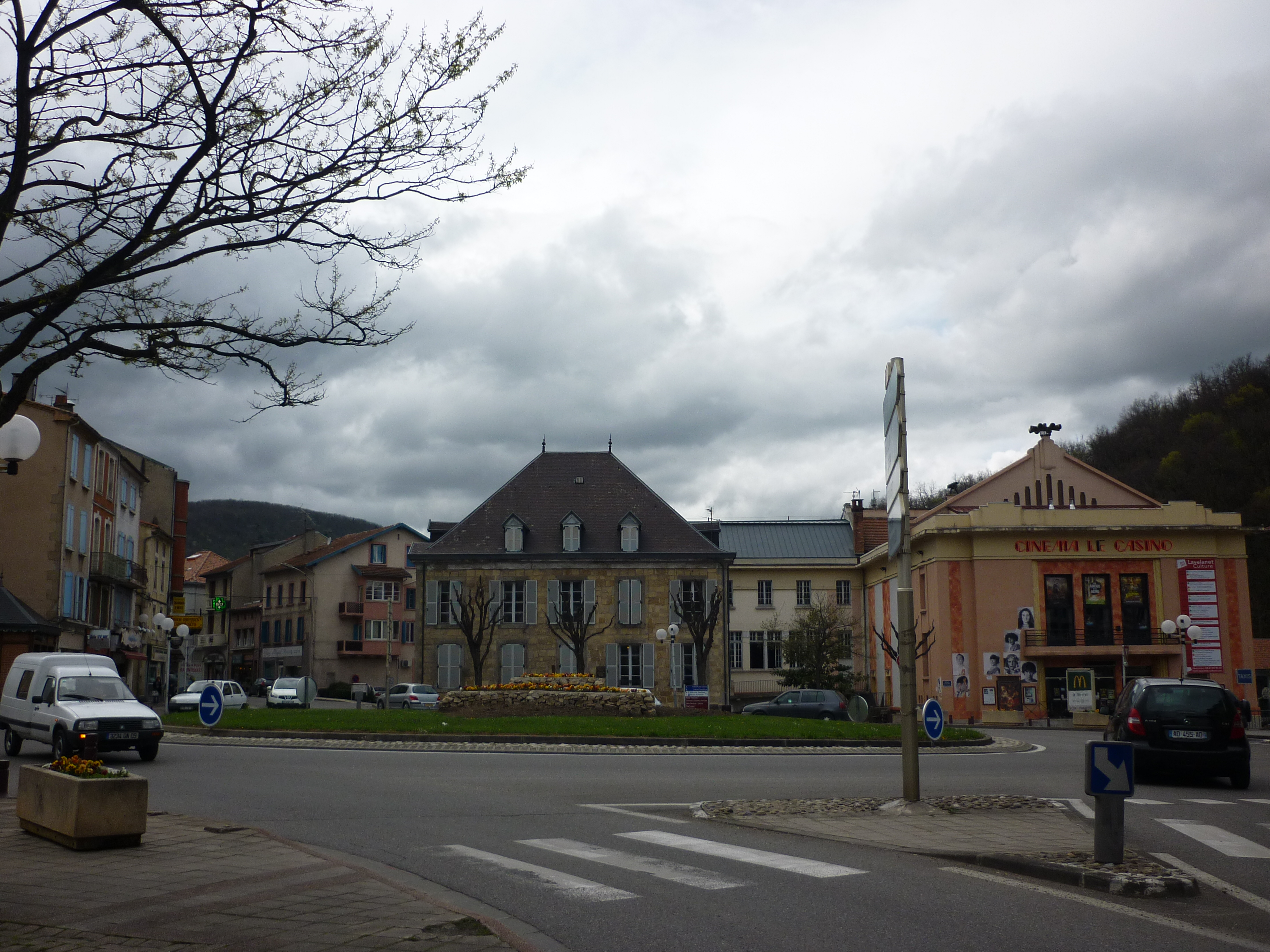 Lavelanet (Ariège, Midi-Pyrénées, France) - le centre ville.